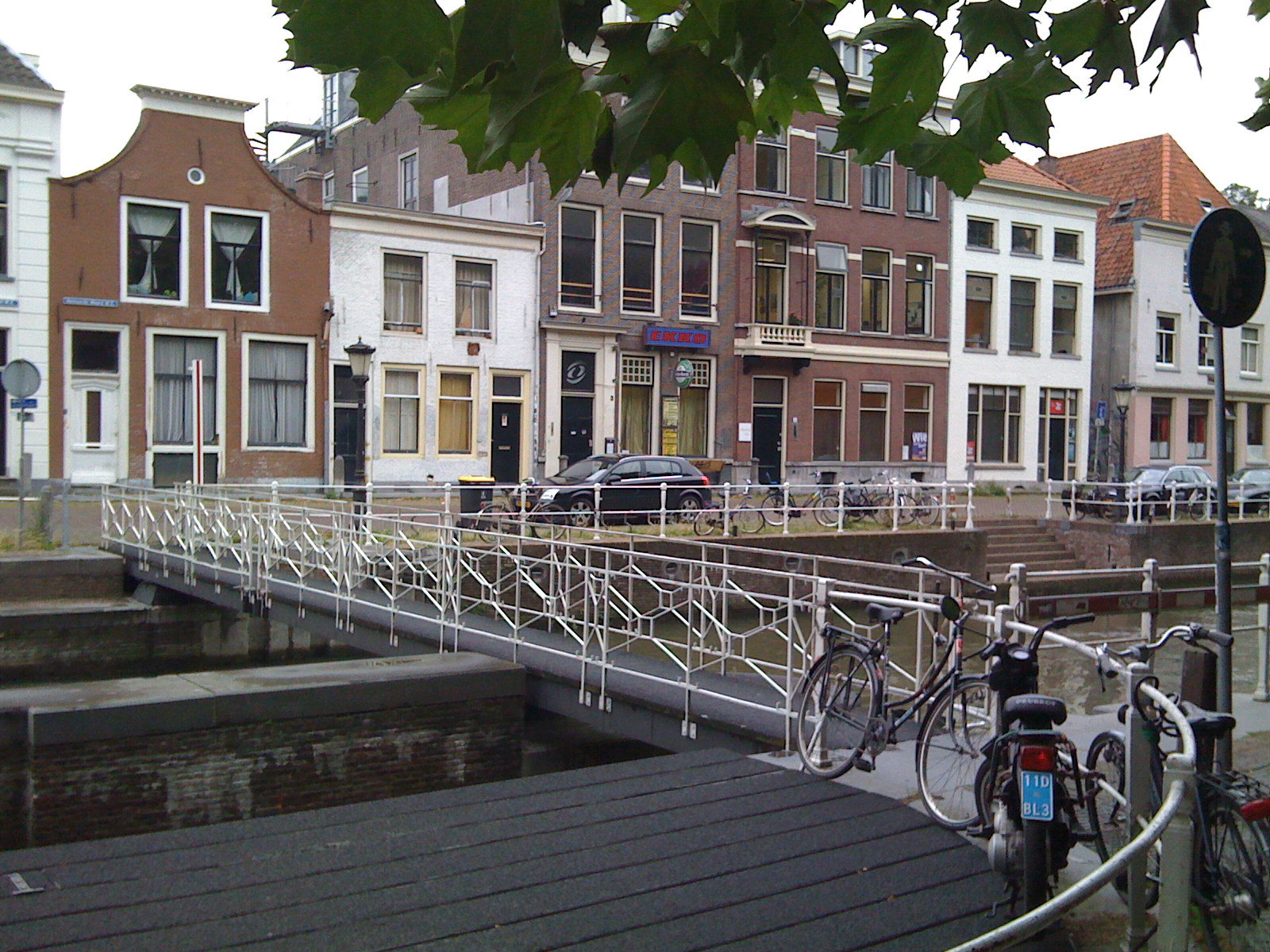 Voetgangersbrug Weerdsluis en Ekko, Bemuurde Weerd, Utrecht.